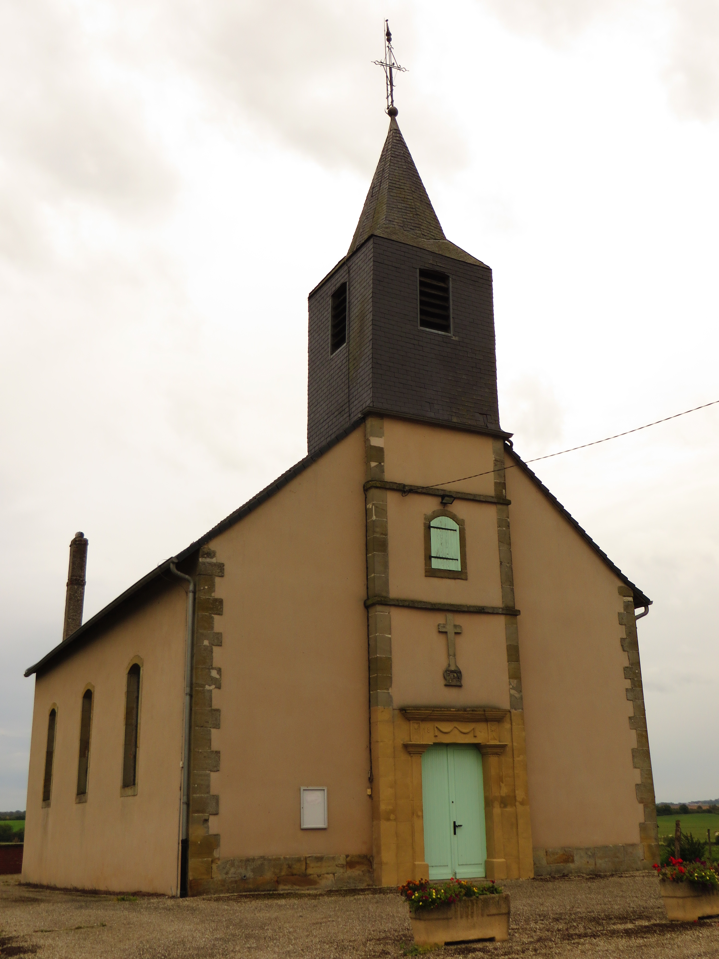 Neufvillage eglise